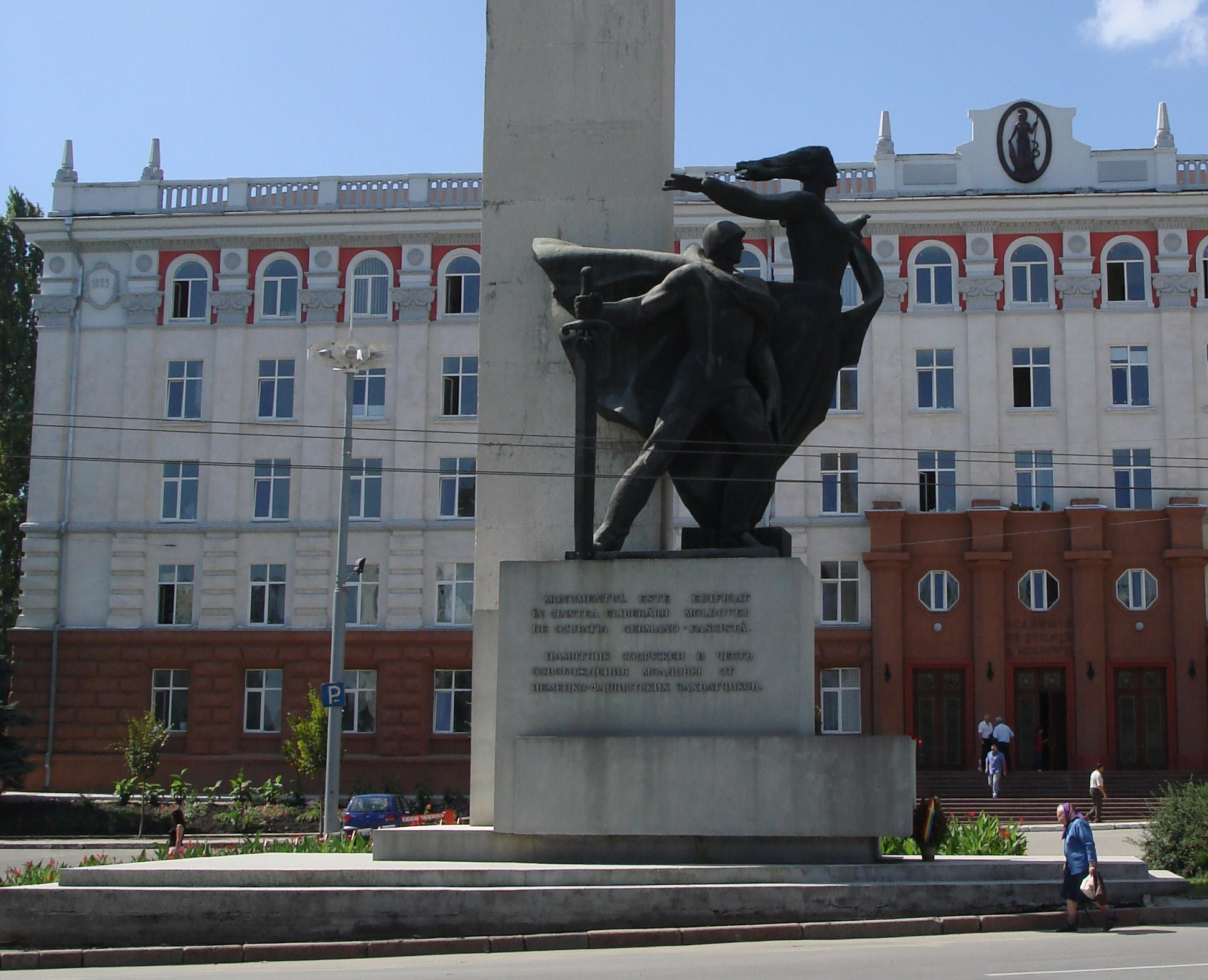 Памятник в честь освобождения Молдавии от немецко-фашистских захватчиков